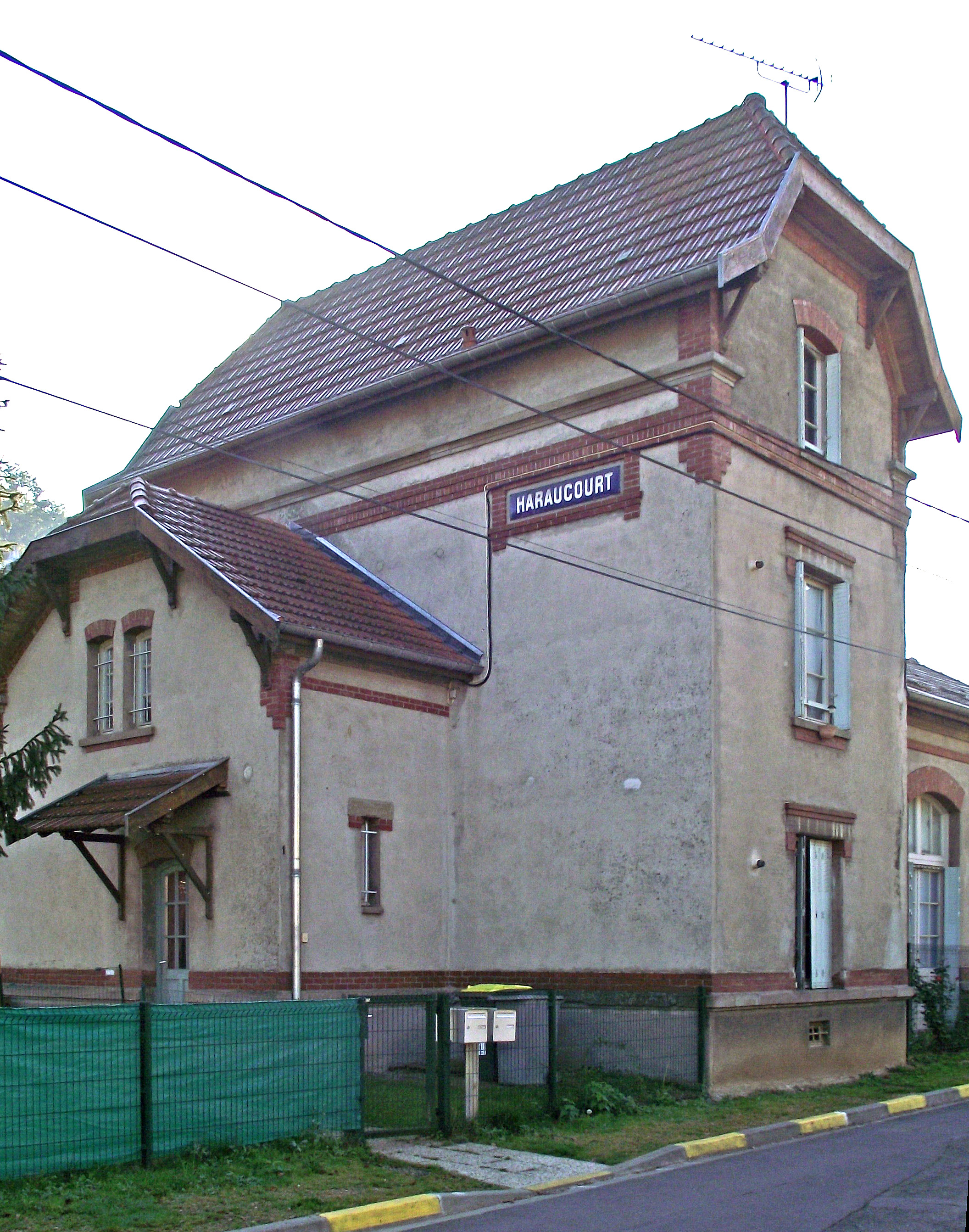 Haraucourt station van een opgeheven spoorlijn.